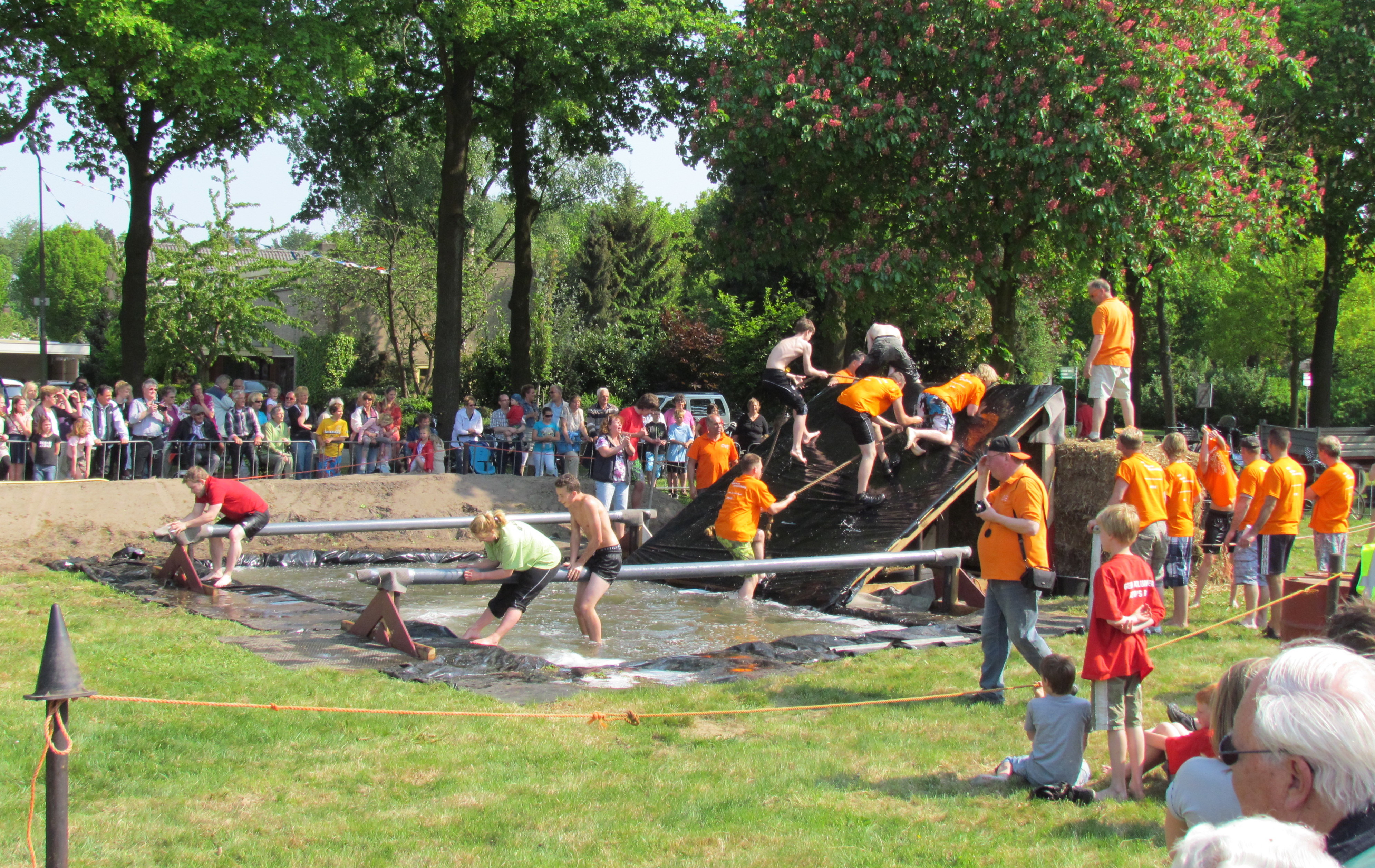 Wedstrijd gladde helling beklimmen op Koninginnedag 2001 in Eefde, NL